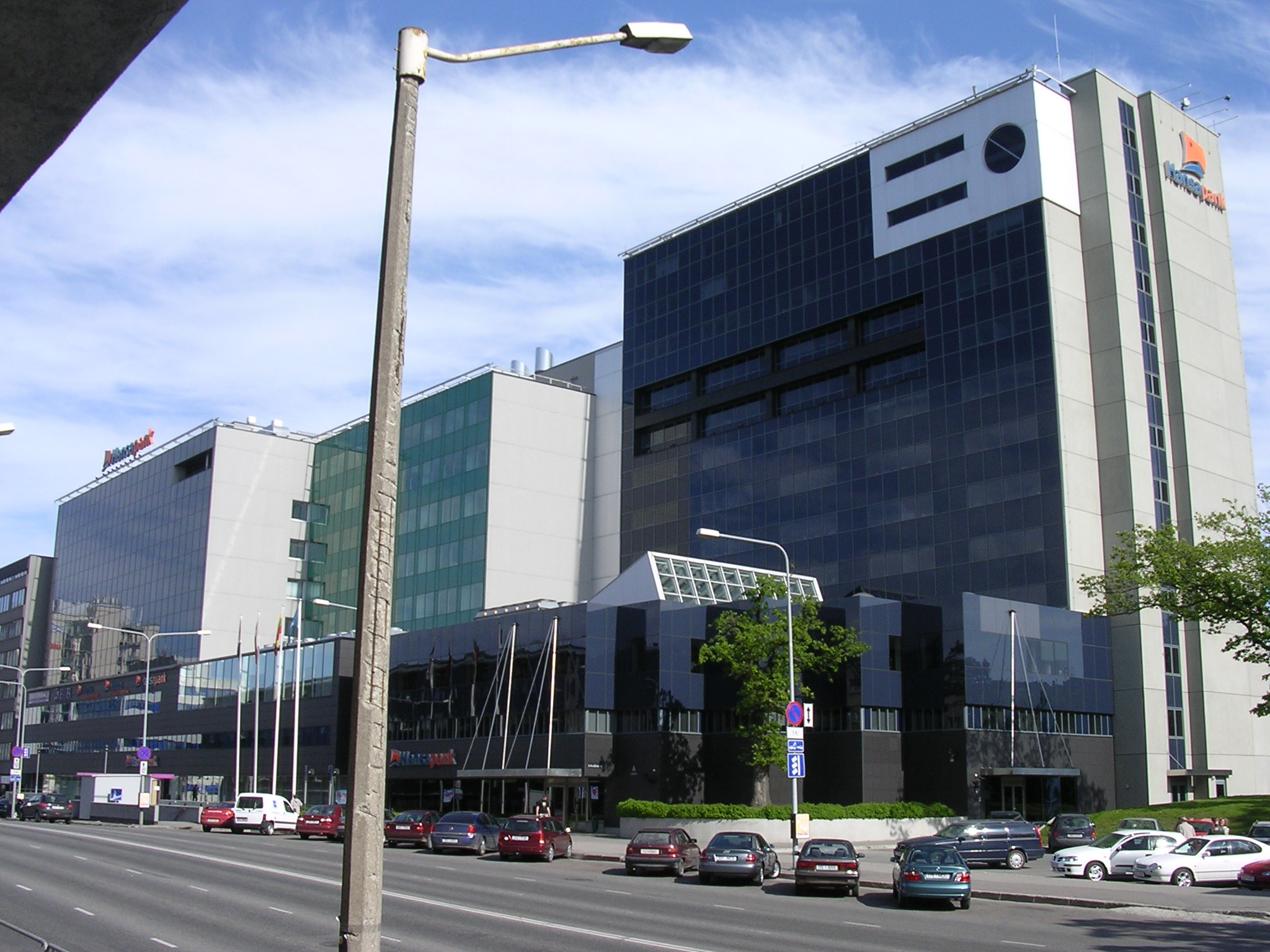 Hansabank (Liivalaia 8–12)